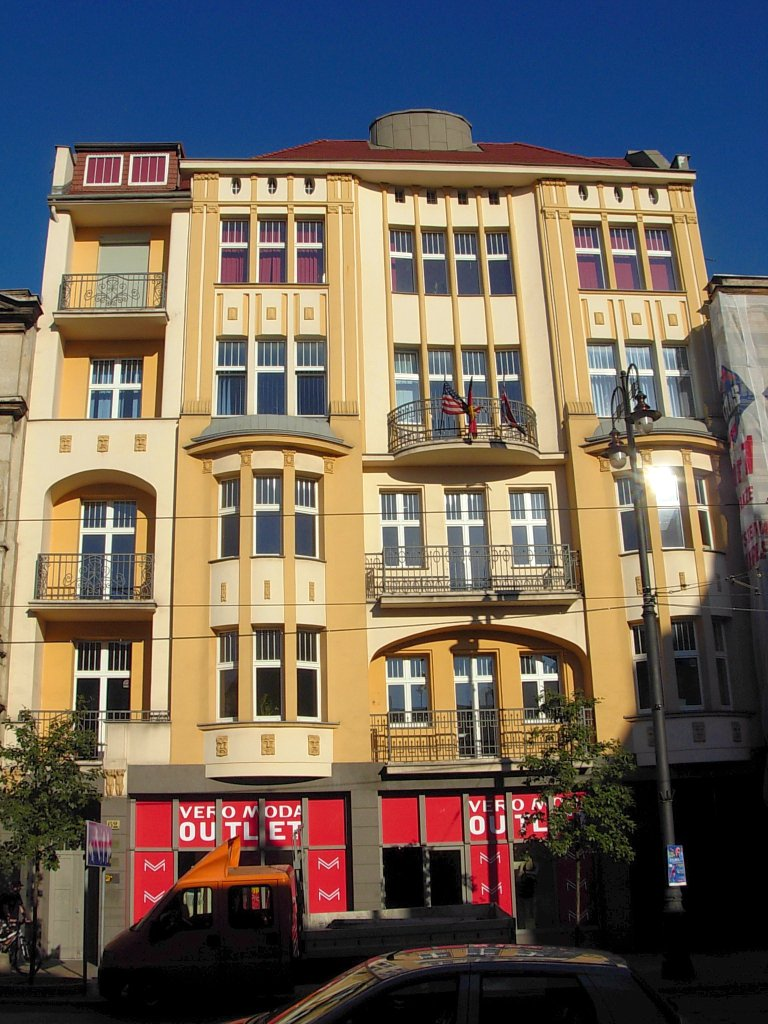 Kamienica ul. Gdańska 62 w Bydgoszczy